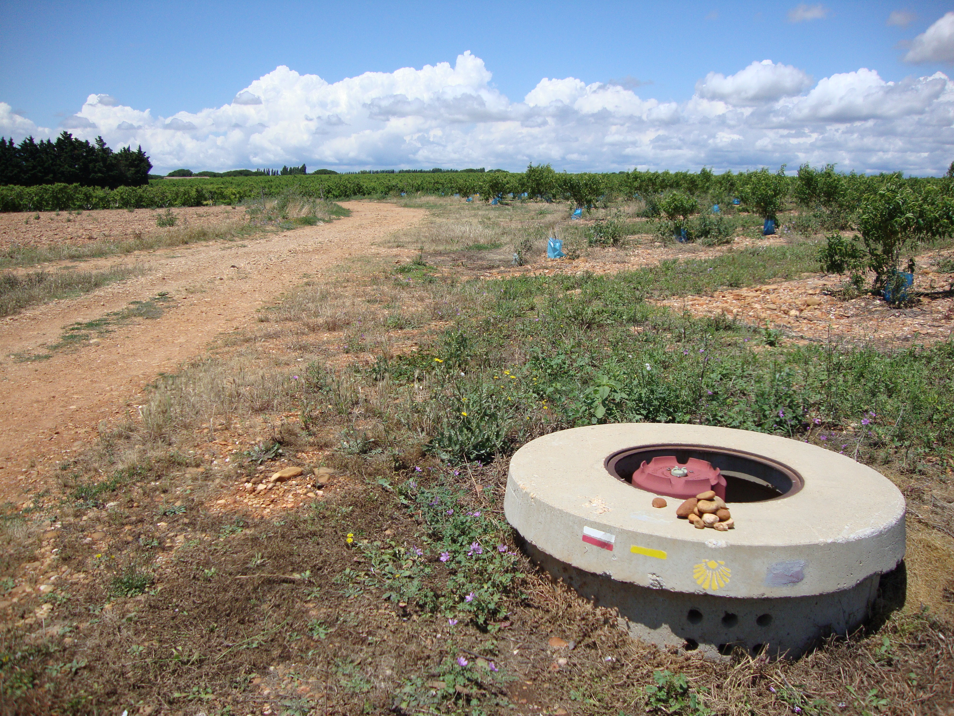 Vauvert (Gard, Fr) balisage jacqaire dans les vignes